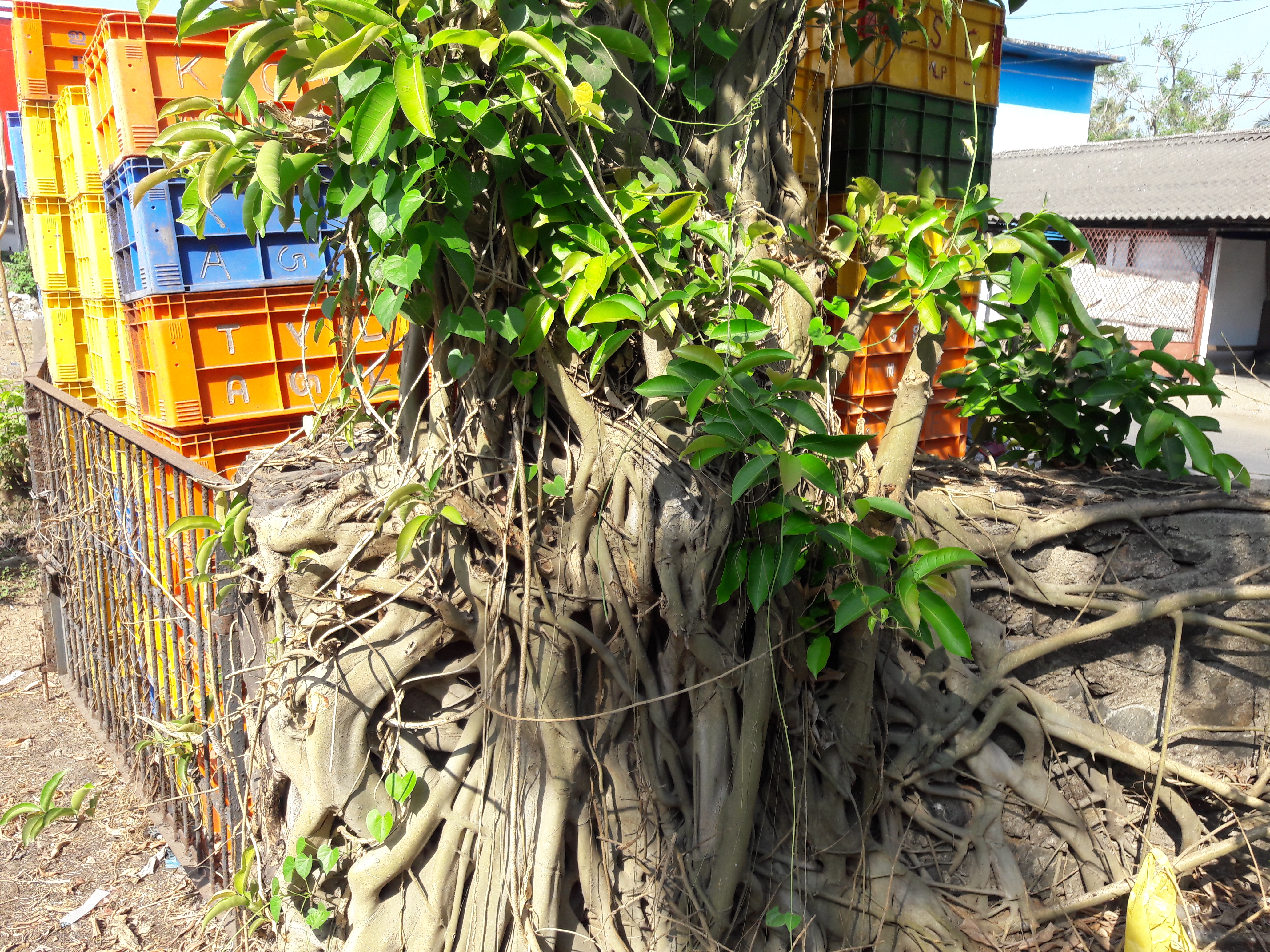 മലപ്പുറം ജില്ലയിലെ പൊന്നാനി താലൂക്കില്‍ വെളിയംകോട് സ്കൂള്‍ പടിയില്‍ പ്രവര്‍ത്തിക്കുന്ന പ്ലാന്‍റ് വില്ലേജ് ചാരിറ്റബിള്‍ സൊസൈറ്റി എന്ന നേച്ചര്‍ ക്ലബ് കൊയലി മരത്തെ പറിച്ചു നടല്‍ പ്രക്രിയ വഴി മറ്റൊരിടത്തേക്ക് മാറ്റുന്നു.Indian Bat tree, Indian Bat fig ശാസ്ത്രീയ നാമം Ficus amplissima കുടുംബം Moraceae.